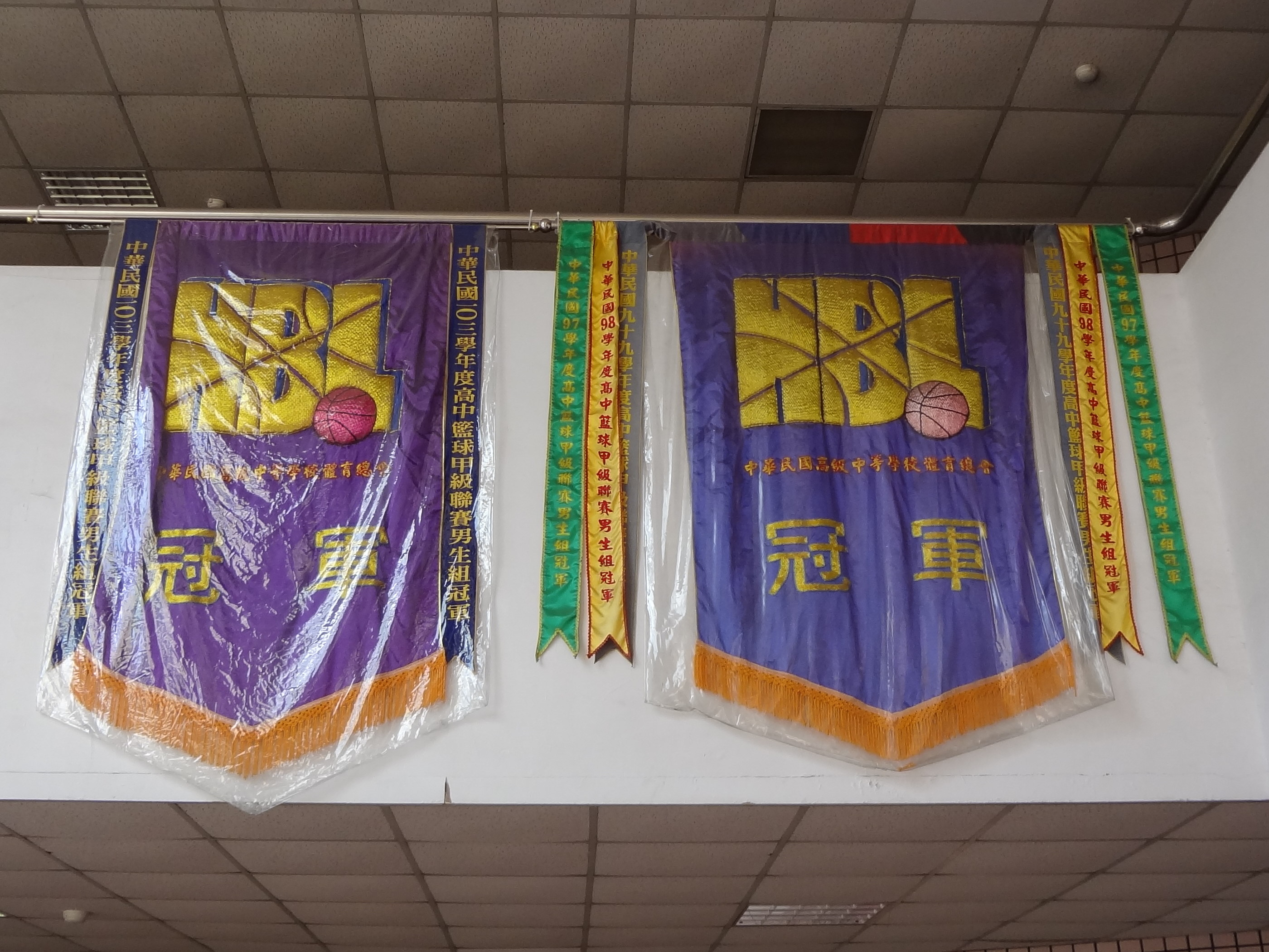 臺北市立松山高級中學獲得的高中籃球甲級聯賽男生組冠軍錦旗，懸掛於該校行政大樓1至2樓之間。